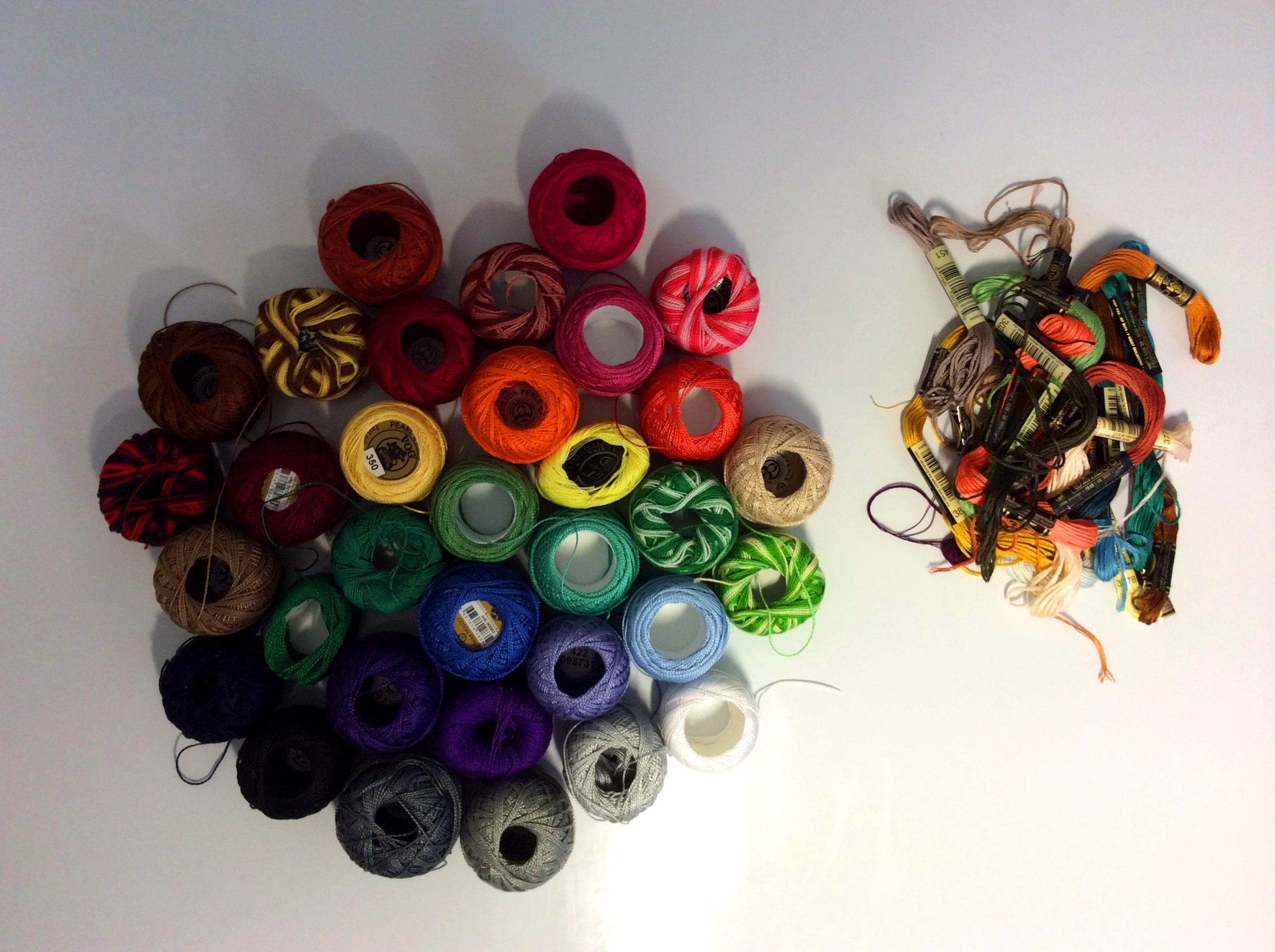 תצלום של חוטי רקמה במגוון צבעים.